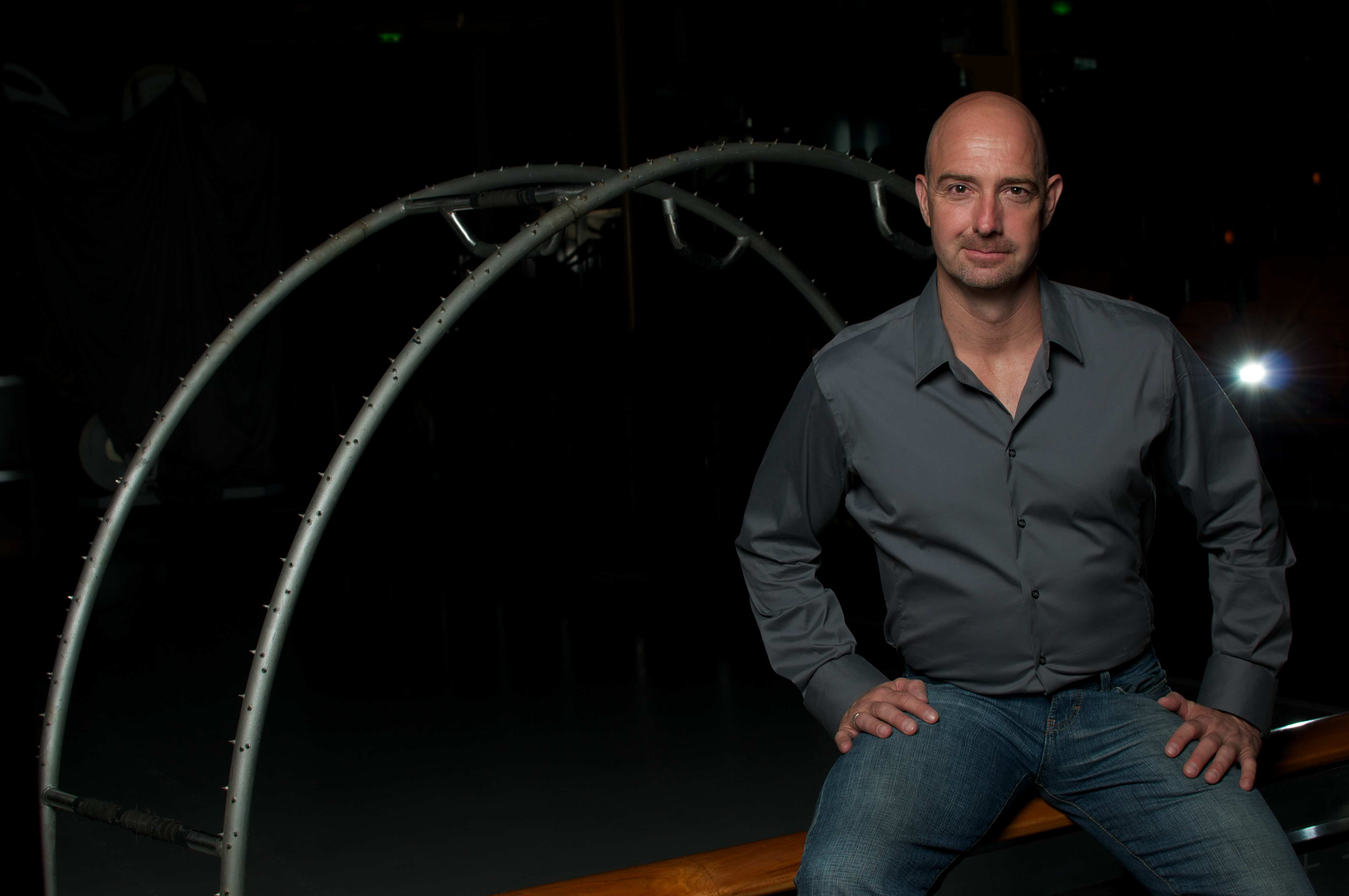 Wolfgang Bientzle